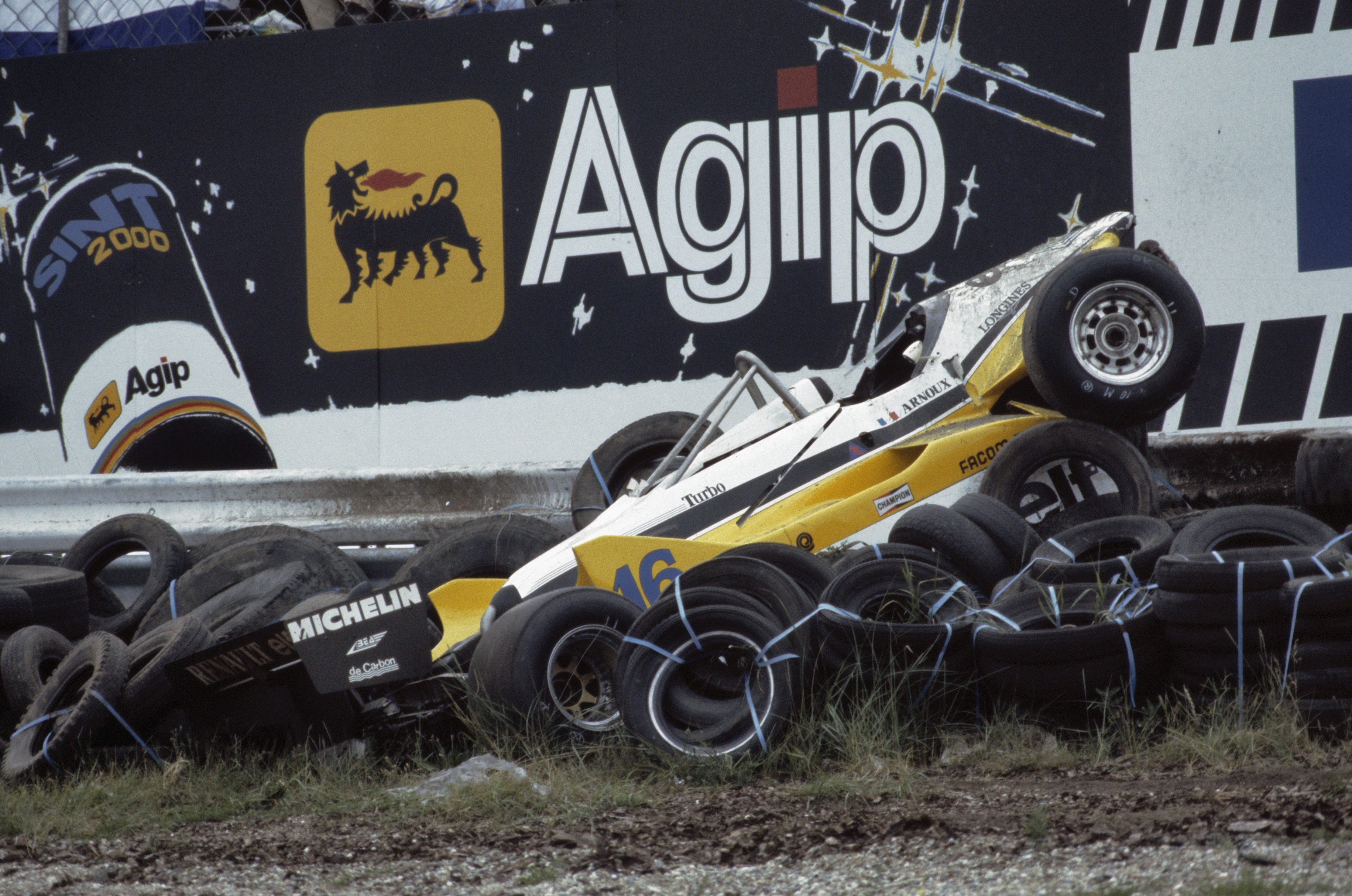 Collectie / Archief : Fotocollectie Anefo Reportage / Serie : [ onbekend ] Beschrijving : Grand Prix op Zandvoort; wagen Arnaux (sic!) in de vangrail Datum : 3 juli 1982 Locatie : Noord-Holland, Zandvoort Trefwoorden : Vangrails, autoraces Fotograaf : Dijk, Hans van / Anefo Auteursrechthebbende : Nationaal Archief Materiaalsoort : Dia (kleur) Nummer archiefinventaris : bekijk toegang 2.24.01.06 Bestanddeelnummer : 253-8756